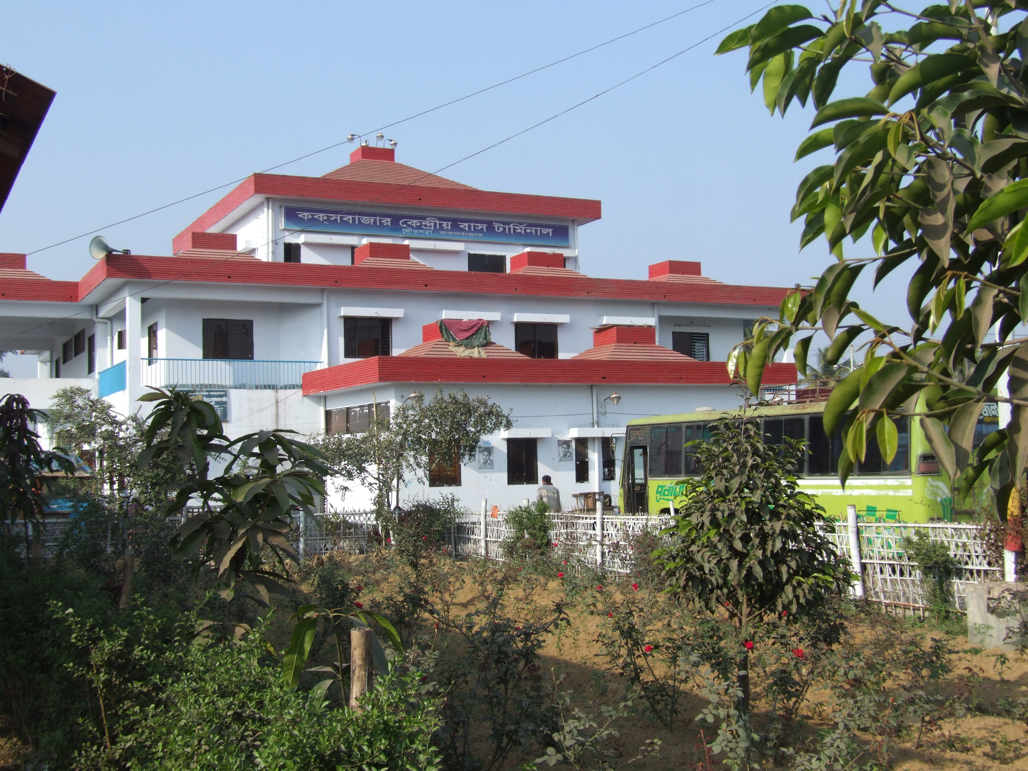 Cox'sbazar Central Bus Terminal.